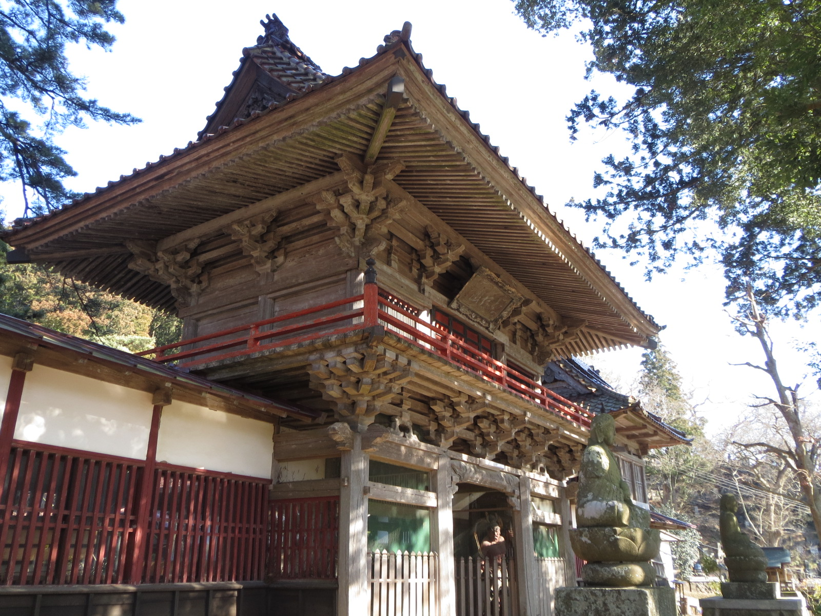 南三陸町にある大雄寺山門 Canon IXY 3